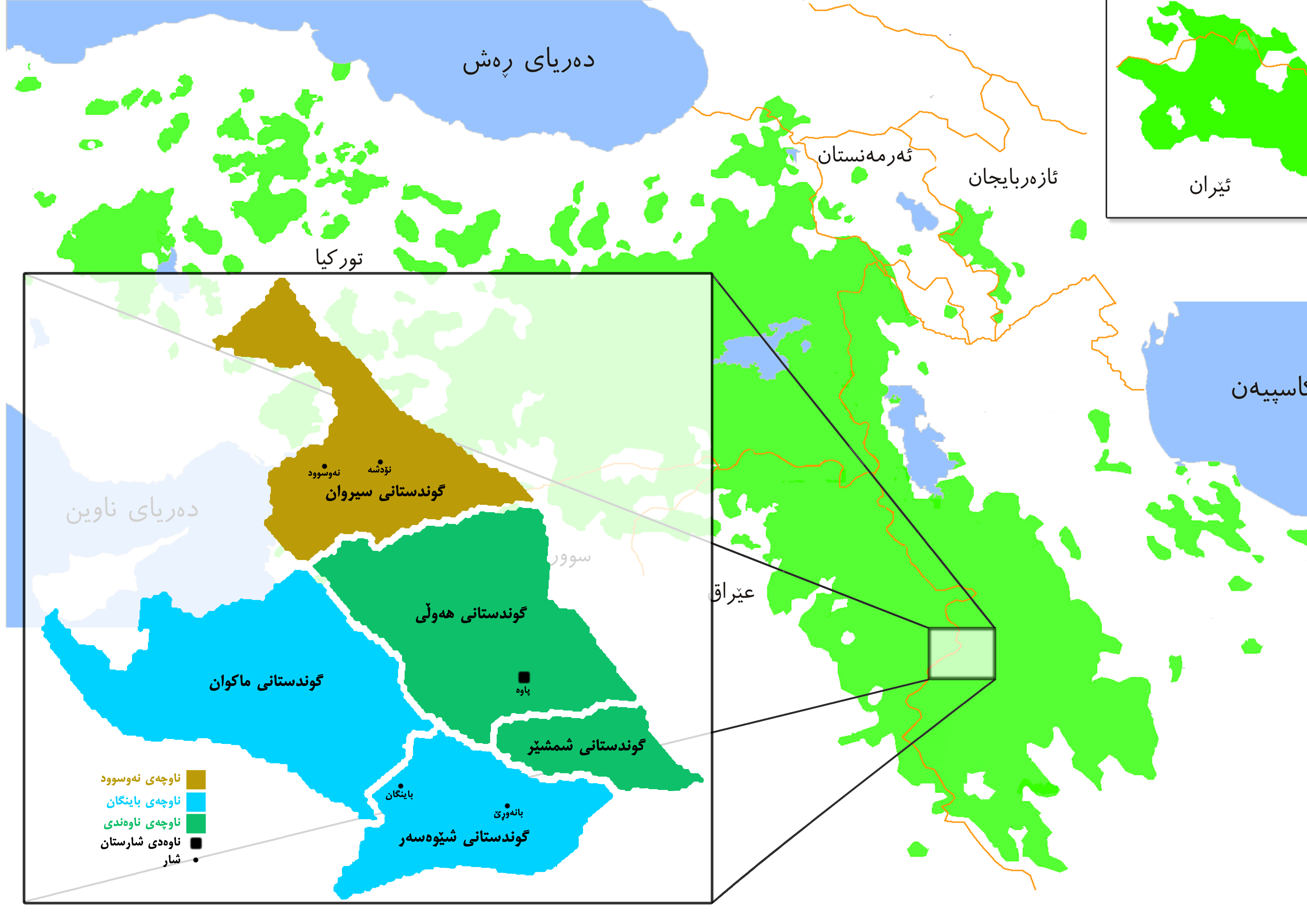 کوردی: شارستانی پاوە لە نێو کوردستان‌دا (ناوچە کوردنشینەکان)